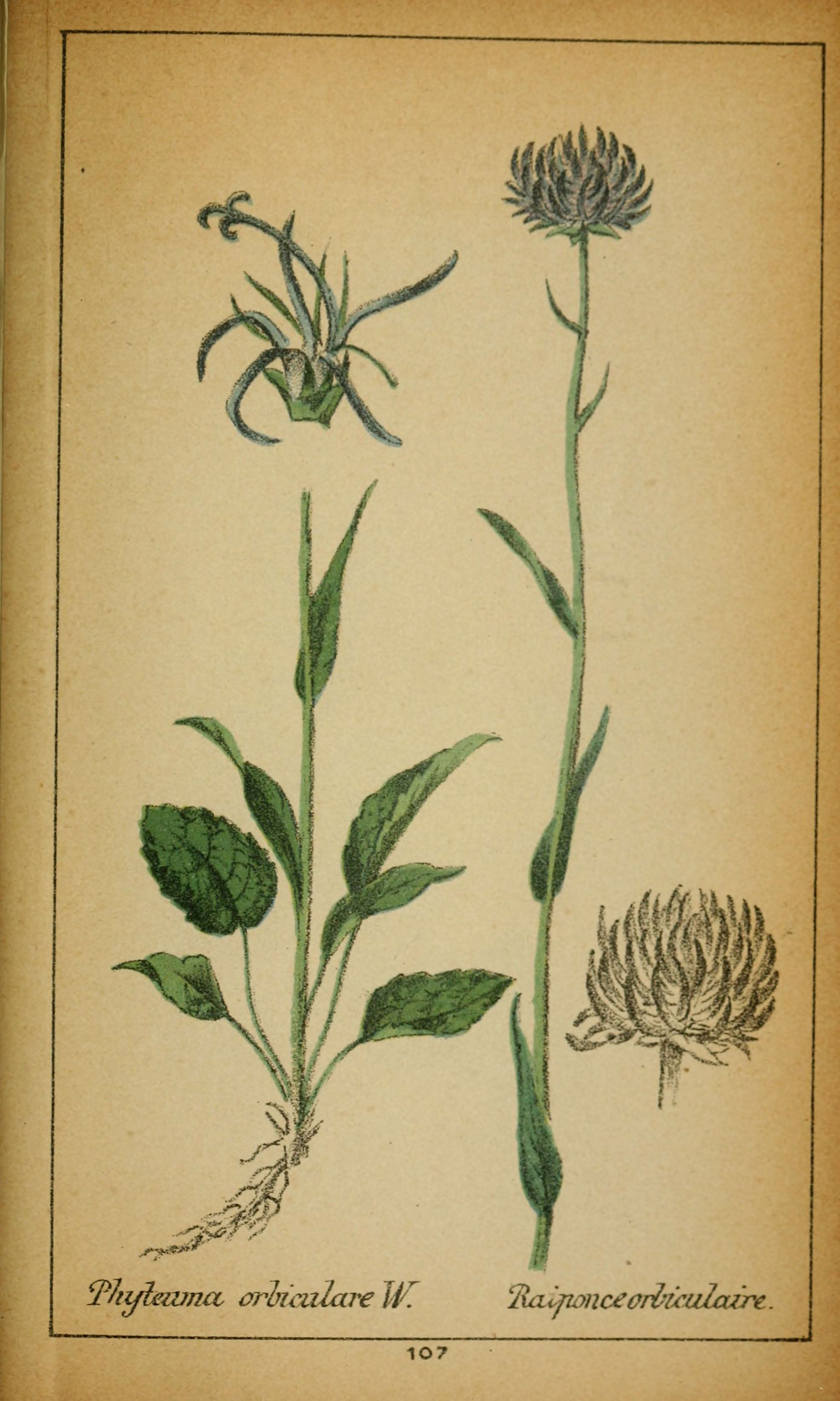 Thiflmmcc orbiculareW. %ù^nce(ninx-uZcure. 107